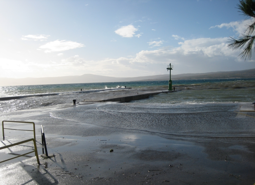 Plima od juga u Crikvenici